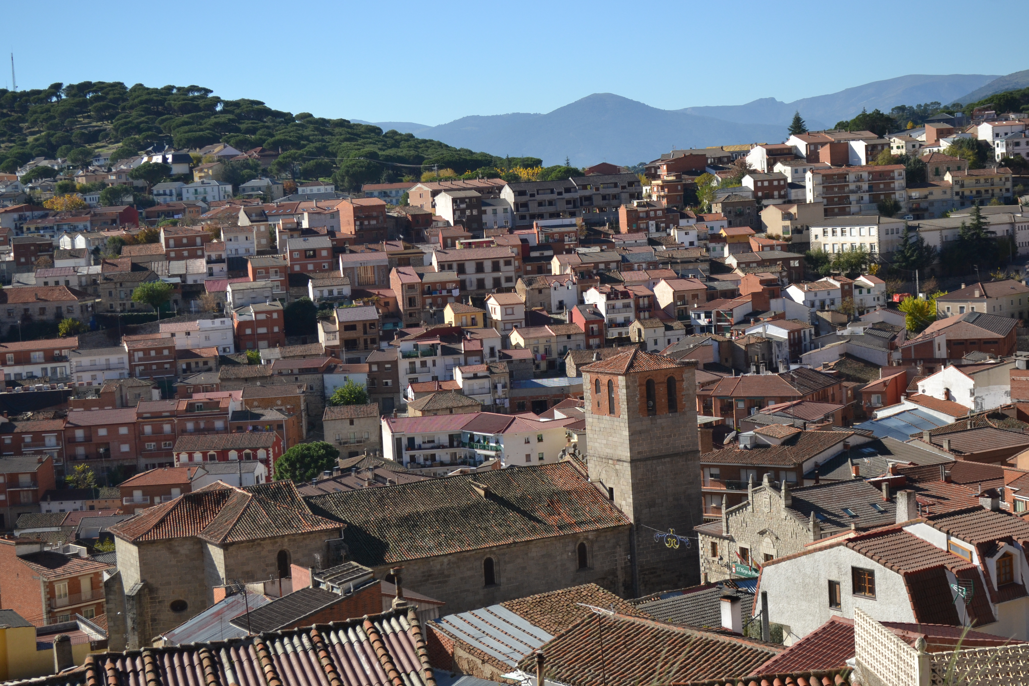 atardecer en Hoyo